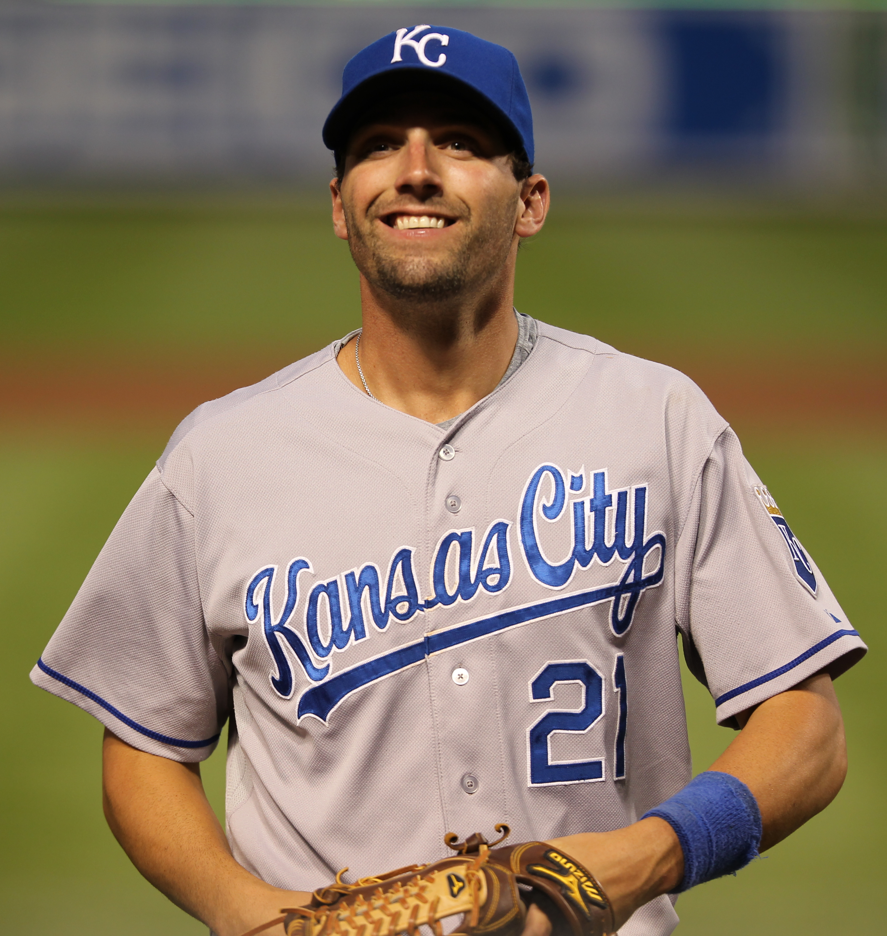 Jeff Francoeur